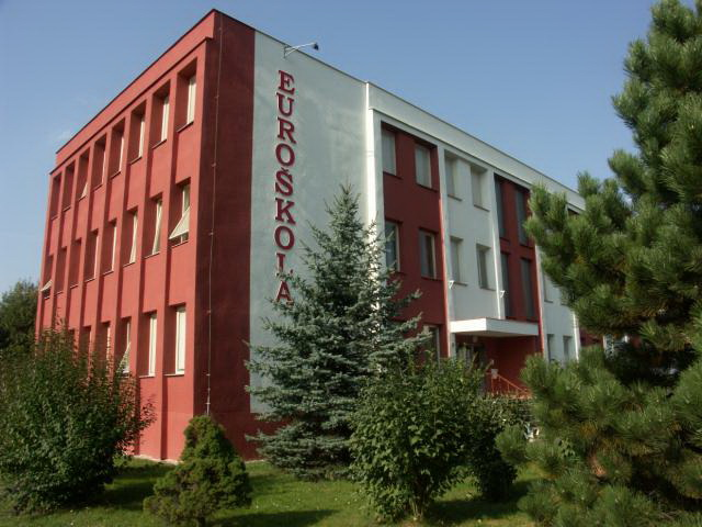 Euroškola Česká lípa střední odborná škola s.r.o.